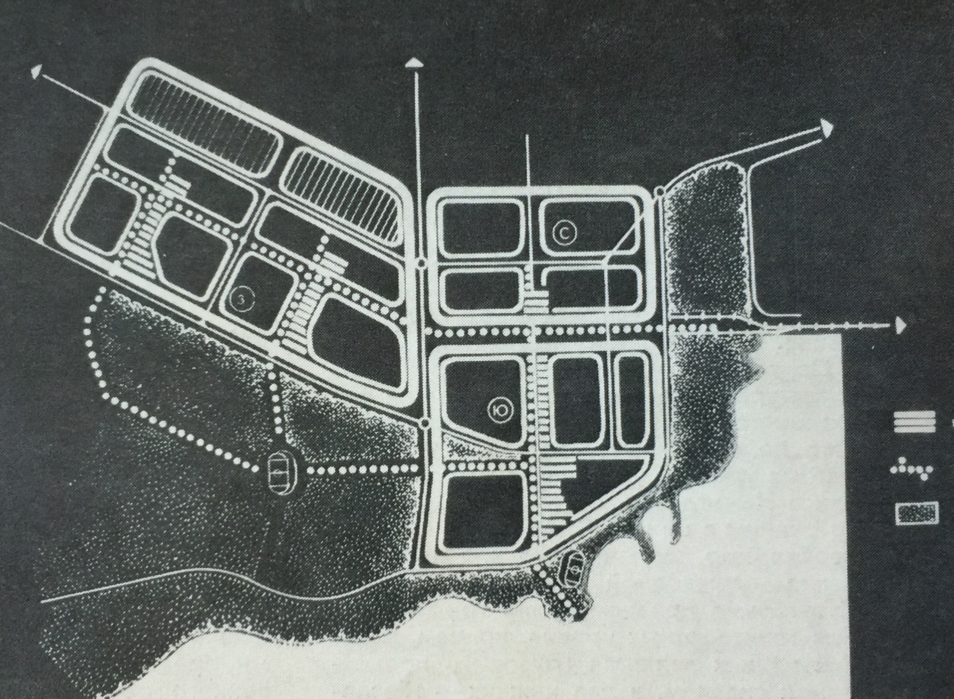 Беларуская (тарашкевіца): Плян забудовы места Салігорску